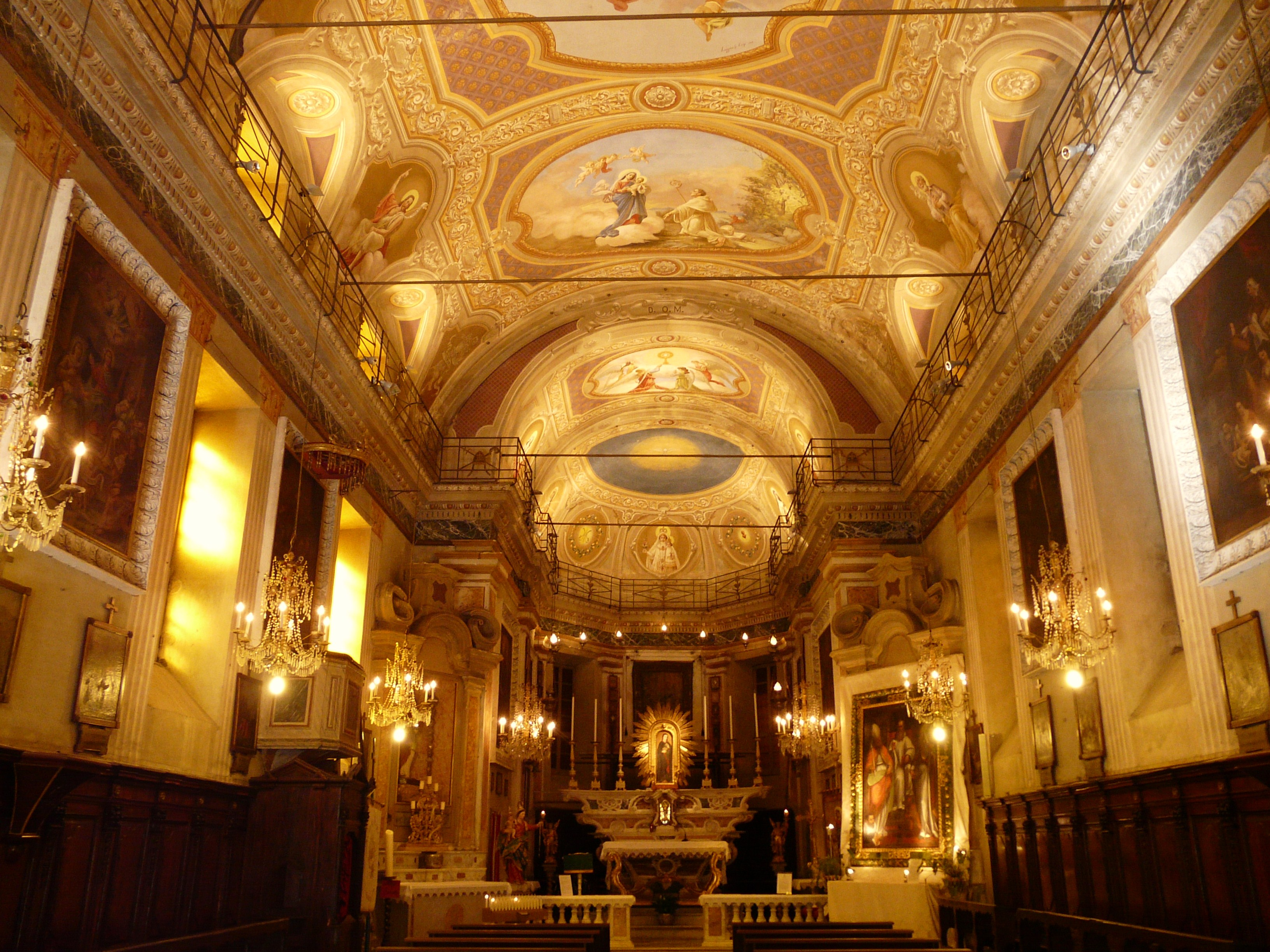 Navata centrale dell'oratorio di San Bernardo, Santa Margherita Ligure, Liguria, Italia